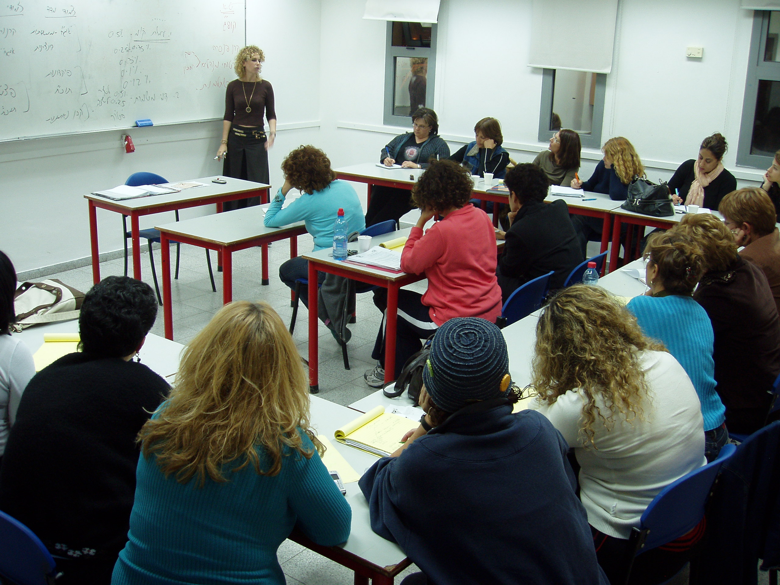 שיעור במכללת פמיננסי